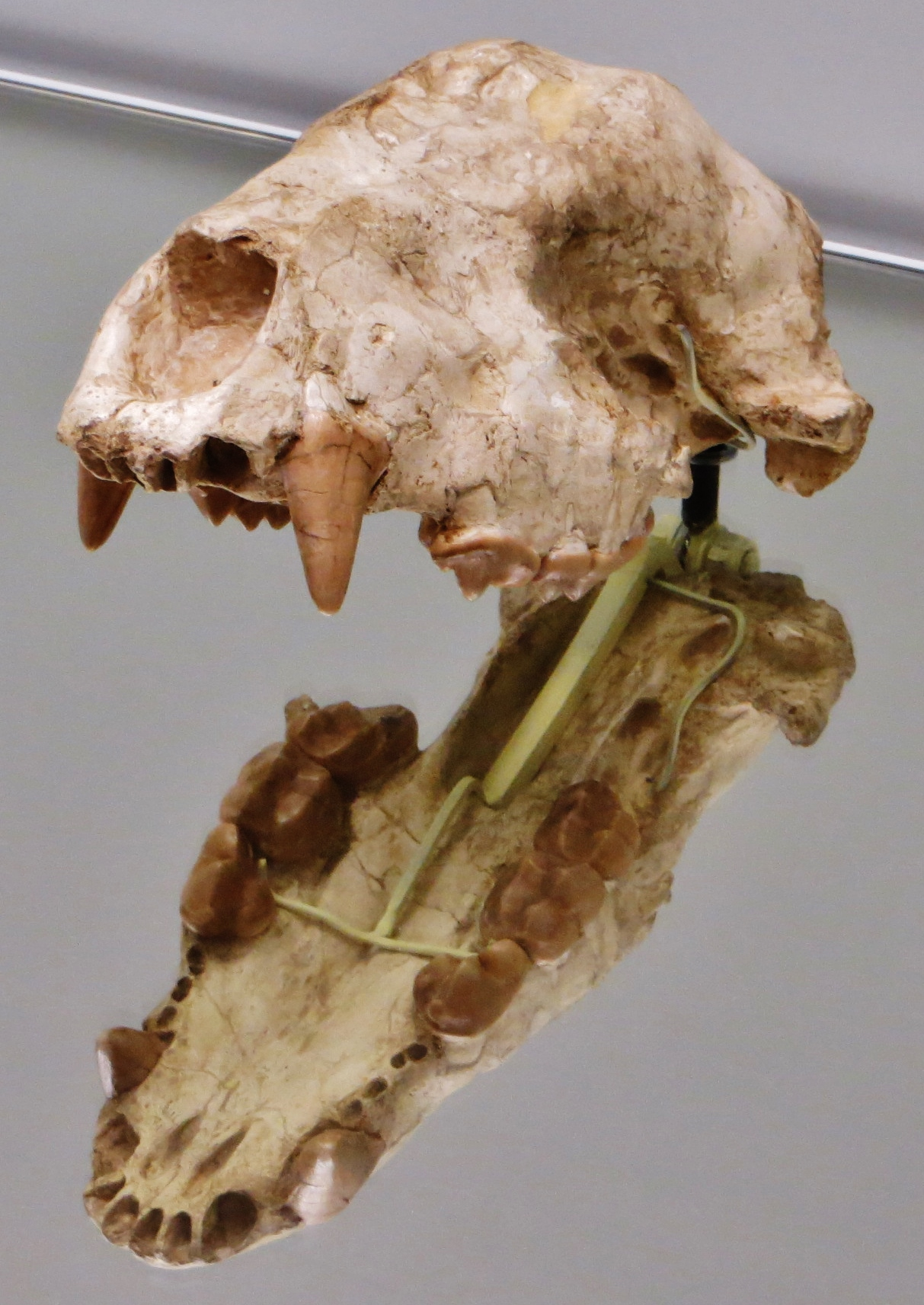 Fossil of Indarctos - Took the picture at Natural History Museum, Basel